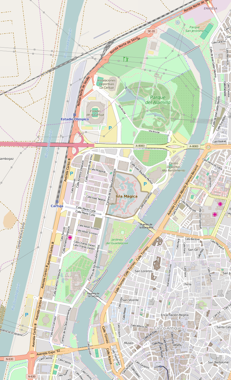 Mapa de la Isla de la Cartuja de Sevilla This map may be incomplete, and may contain errors. Don't rely solely on it for navigation.